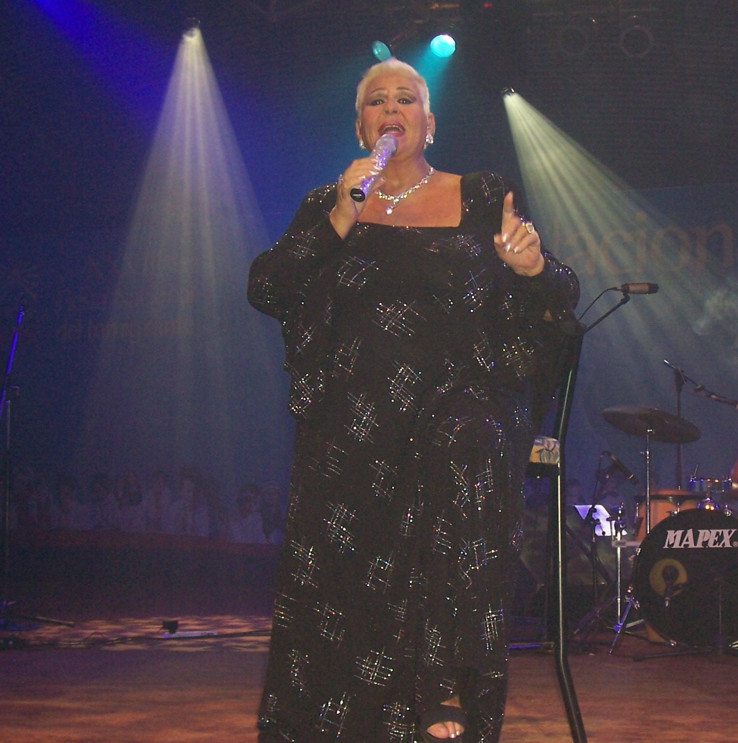 María Marta Serra Lima en la Fiesta Nacional del Inmigrante, realizada en la ciudad de Oberá, Misiones. Año 2007.